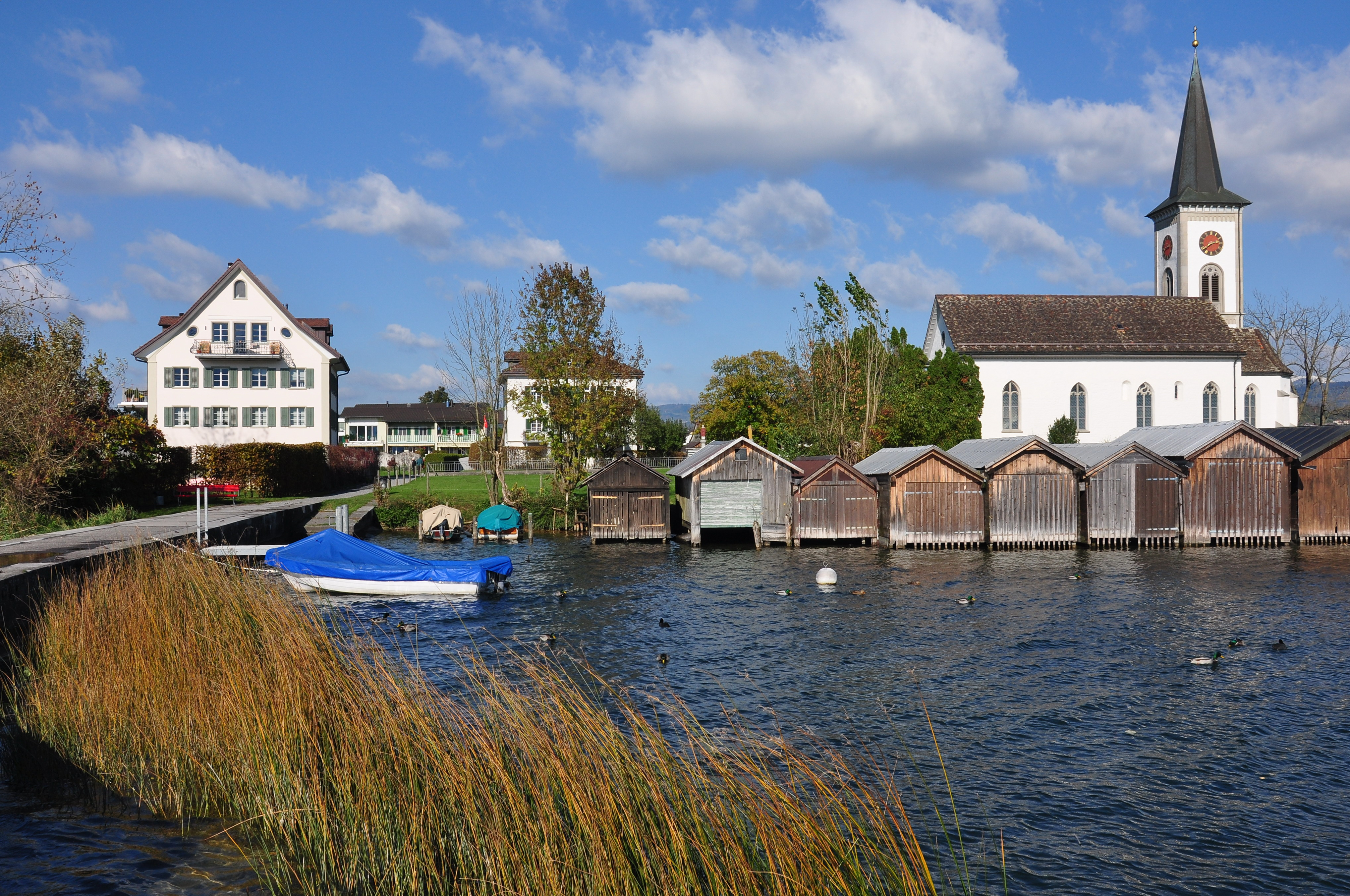 Busskirch in Jona (Switzerland) on Obersee (upper Lake Zürich) shore